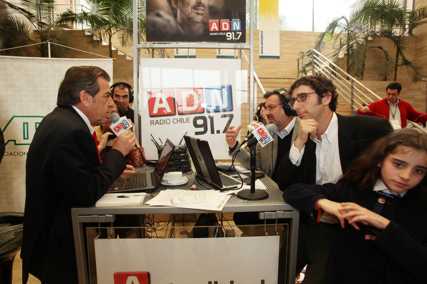 Eduardo Frei en debate Archi